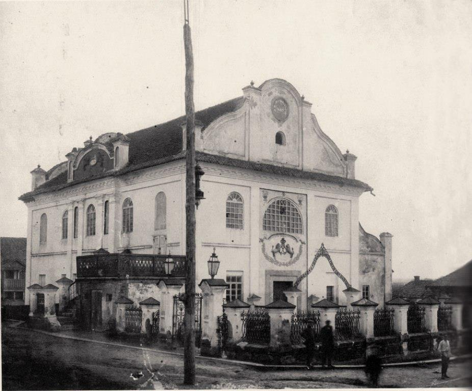 Большая синагога в Шепетовке, фото этнографической экспедиции С.Ан-ского в 1912-1914 гг.